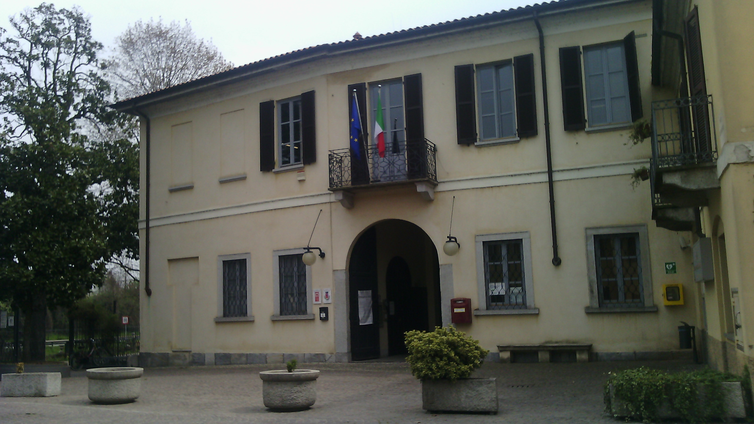 Villa Beolco-Negri a Cassinetta di Lugagnano (MI) - Italy